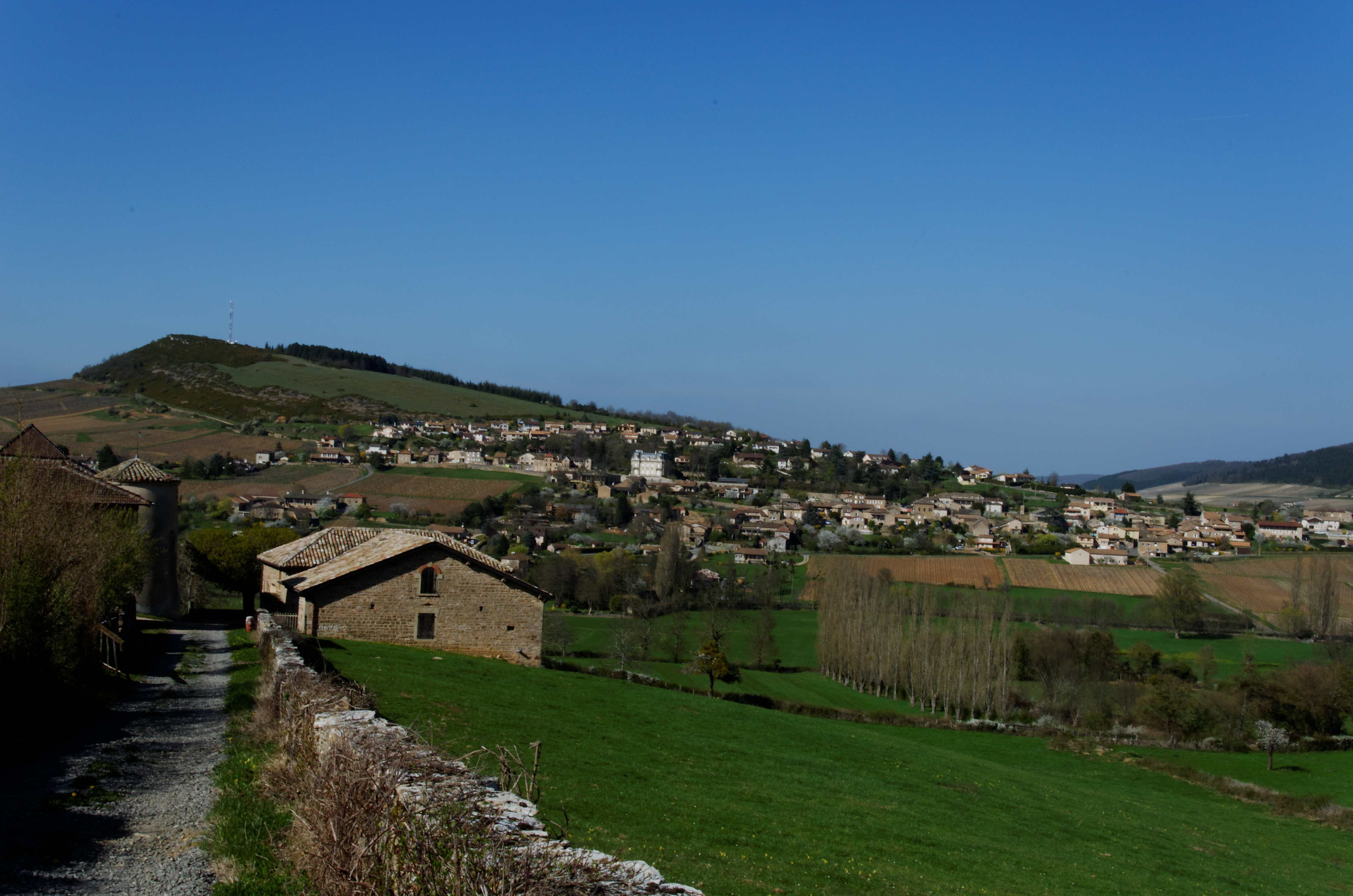 Commune de Bussières, Saône-et-Loire (71), France. Vue sur la hameau de Grand Bussières et le Monsard depuis les Essertaux.